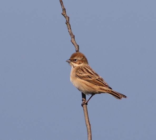 Bruant de Pallas (Emberiza pallasi), Heuksando, Corée du Sud.